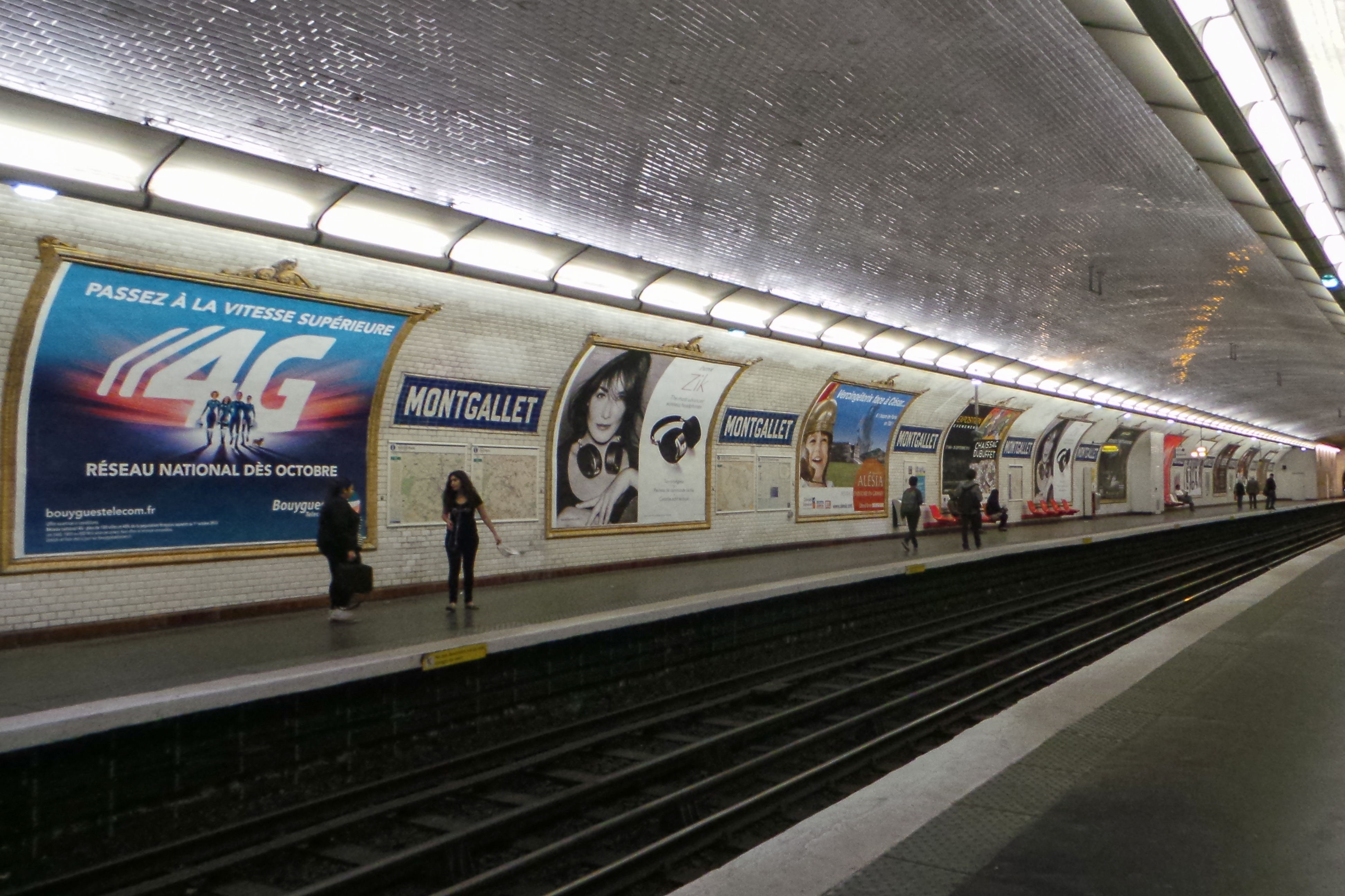 Station de métro Montgallet, ligne 8 du métro de Paris - Paris, France